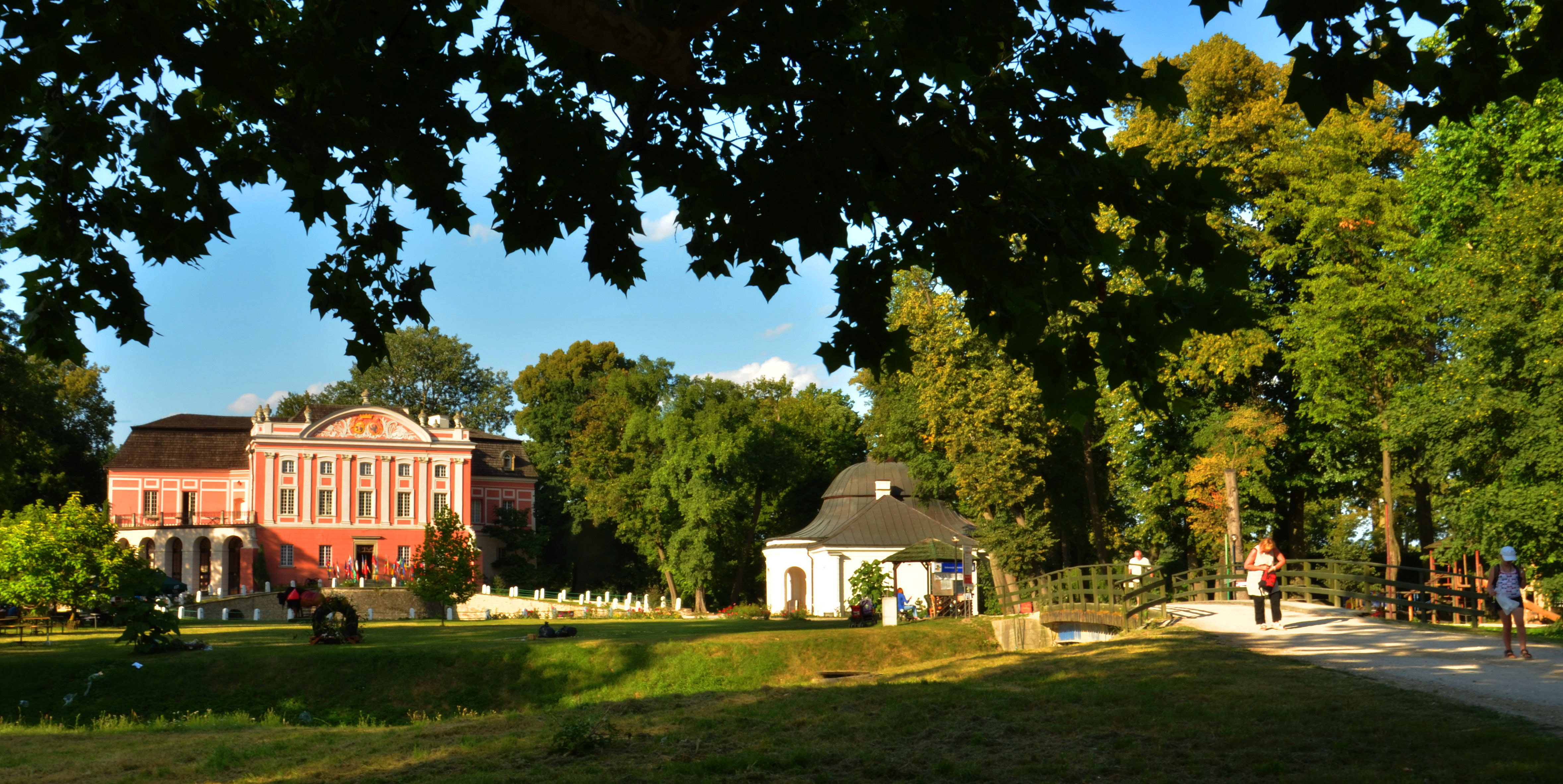 Kurozwęki, zespół pałacowy, XIV/XV, XVII, XVIII w.